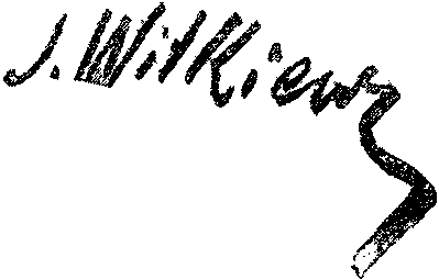 Bolesław Prus, właść. (Aleksander Głowacki)